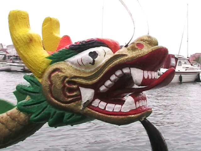 mueritzsail_kopfdrachenboot